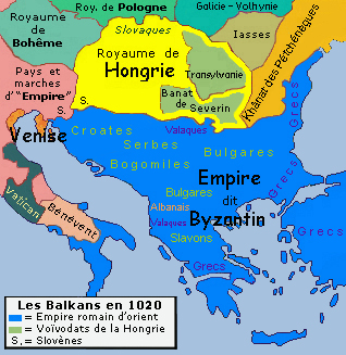 Comme les 36 autres de cette série, est une synthèse du "Westermann Grosser Atlas zur Weltgeschichte", 1985, ISBN 3-14-100919-8, du "DTV Atlas zur Weltgeschichte", 1987 traduit chez Perrin, ISBN 2-7242-3596-7, du "Putzger historischer Weltatlas Cornelsen" 1990, ISBN 3-464-00176-8, de l'"Atlas historique Georges Duby" chez Larousse 1987, ISBN 2-03-503009-9, de la série des "Atlas des Peuples" d'André et Jean Sellier à La Découverte : "Europe occidentale" : 1995, ISBN 2-7071-2505-9, "Europe centrale" : 1992, ISBN 2-7071-2032-4, "Orient" : 1993, ISBN 2-7071-2222-X, avec des détails pris dans le Történelmi atlasz de l'Académie hongroise, 1991, ISBN 963-351-422-3 CM et dans l'Atlas istorico-geografic de l'Académie roumaine, 1995, ISBN 973-27-0500-0.